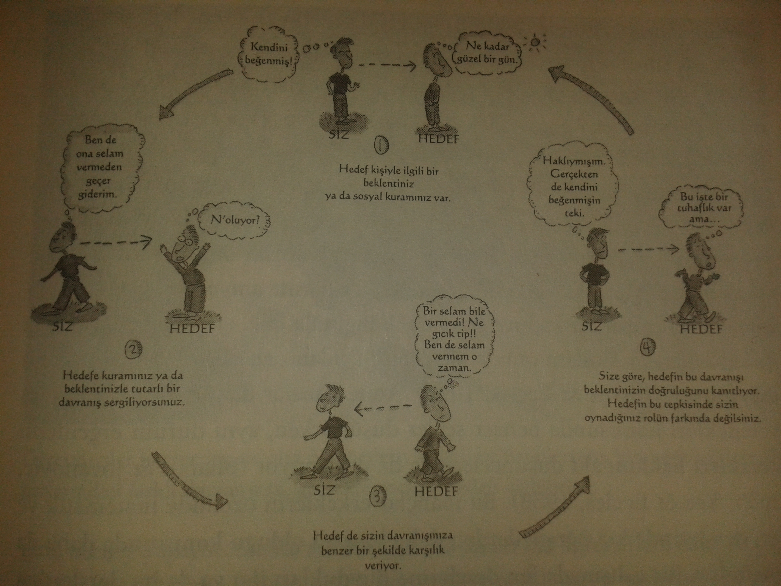 Aronson, E., Wilson, T. D., & Akert, R. M. (2012). Sosyal psikoloji (Gündüz, O. Çev.). İstanbul: Kaknüs Yayınları.s.137